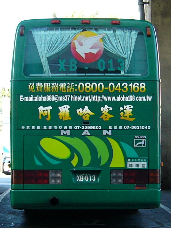 阿羅哈客運2004年MAN 18.410HOCL大客車XB-013車尾外觀。